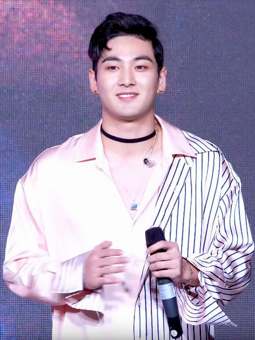 170831 코엑스 월드컵 거리응원 강동호 '있다면'